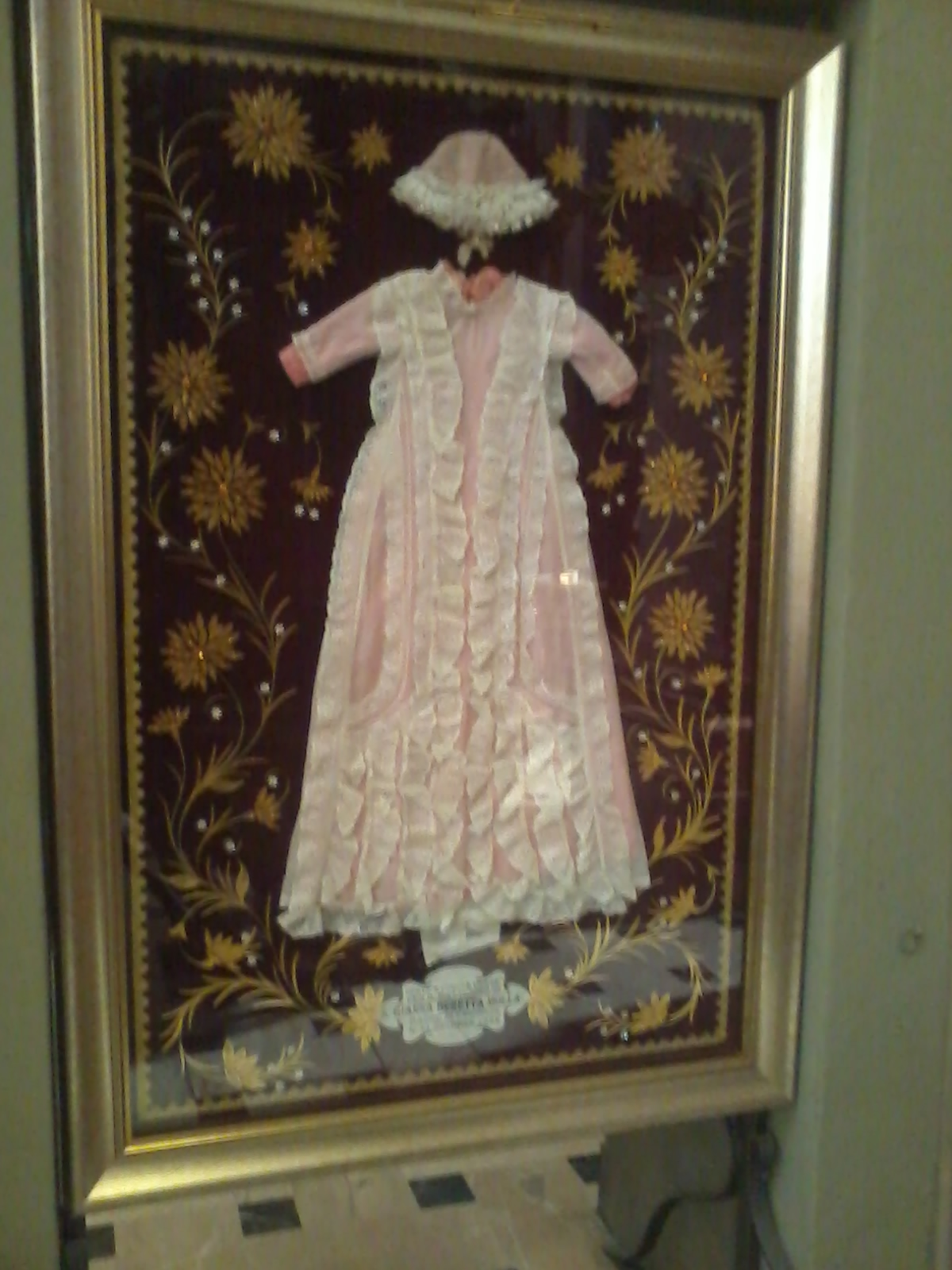 La veste battesimale di Santa Gianna Beretta Molla conservata presso la basilica di San Martino di Magenta (MI)